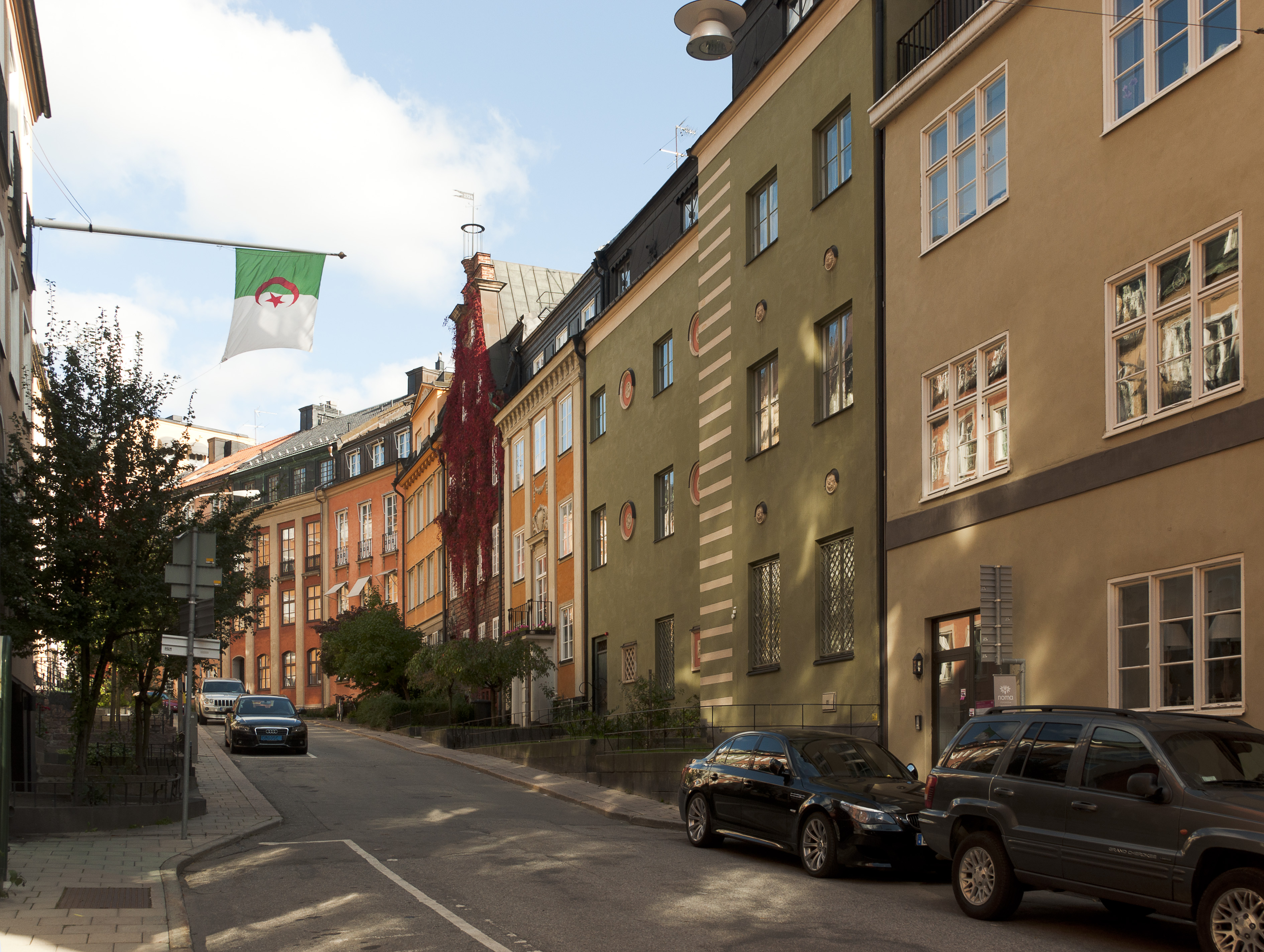 Danderydsgatan med Sandströmska Skolbyggnaden i grönt.